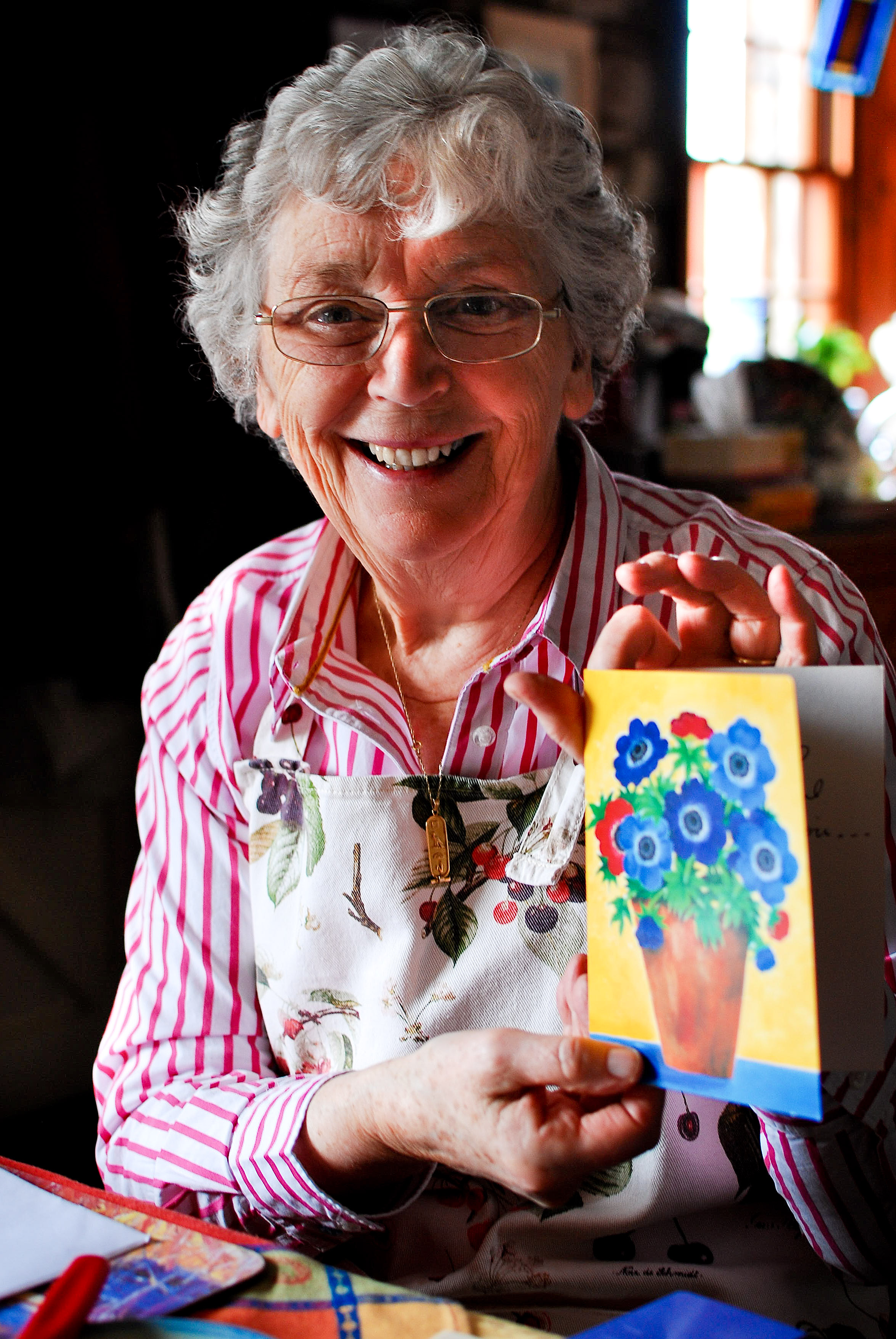 Clara's Card